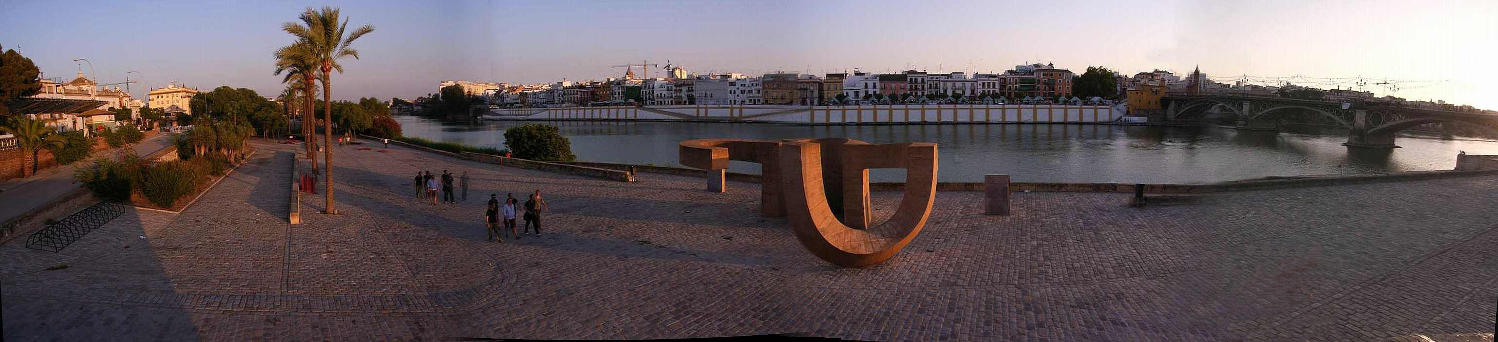 Panorama-montaje Guadalquivir, Triana-Sevilla